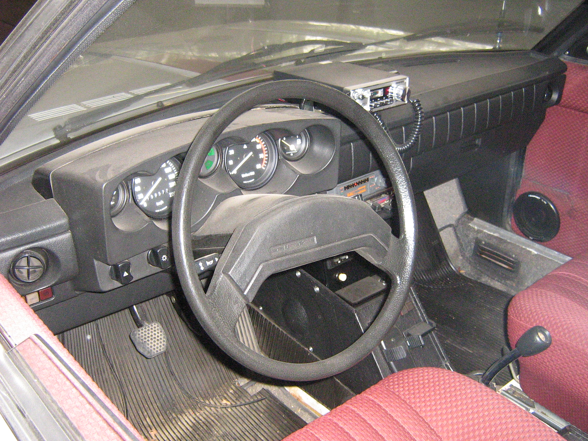 1980 Tatra T-613 Ambulance